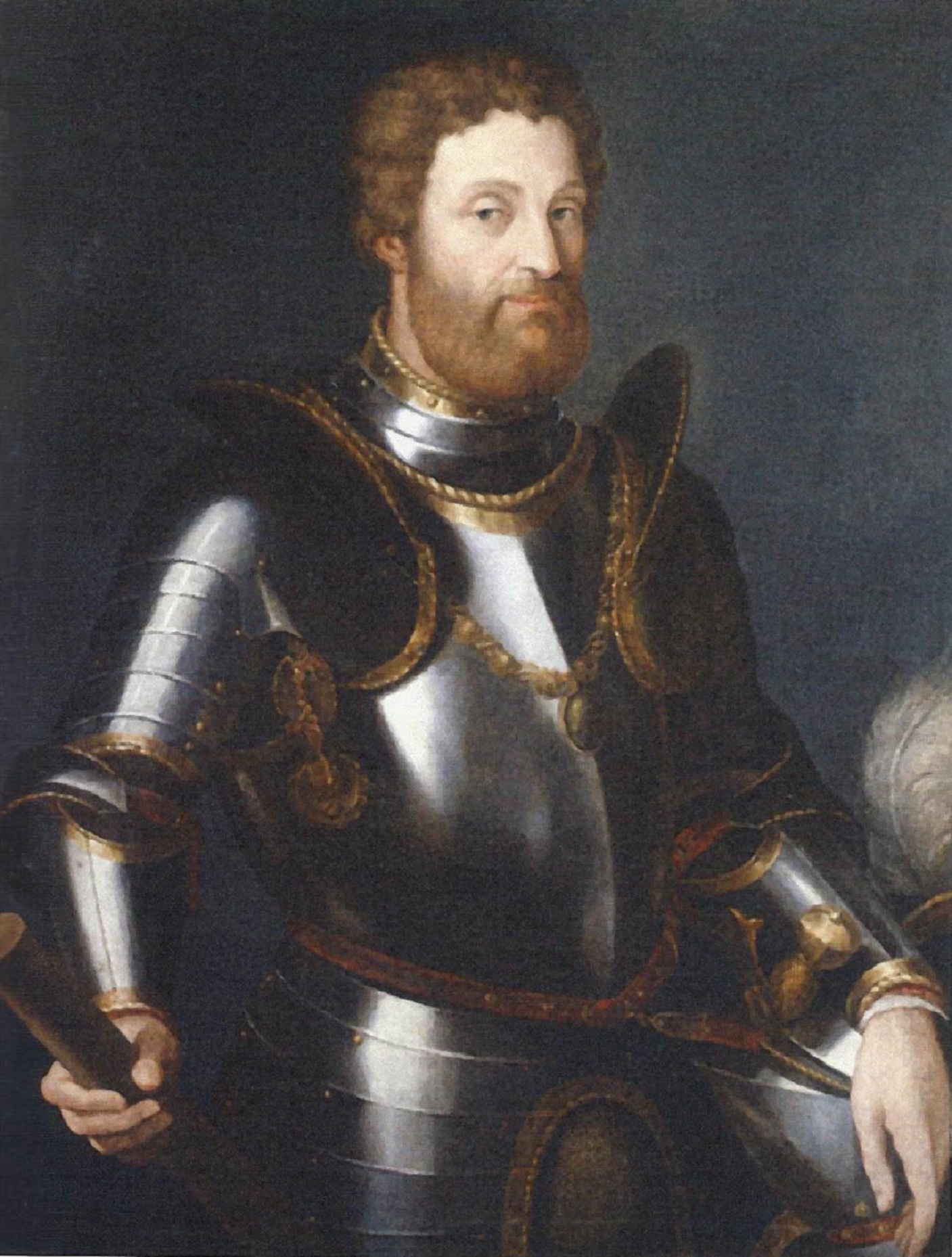 Ritratto in Armatura di Marcantonio I Colonna, con il Collare dell'Ordine di San Michele